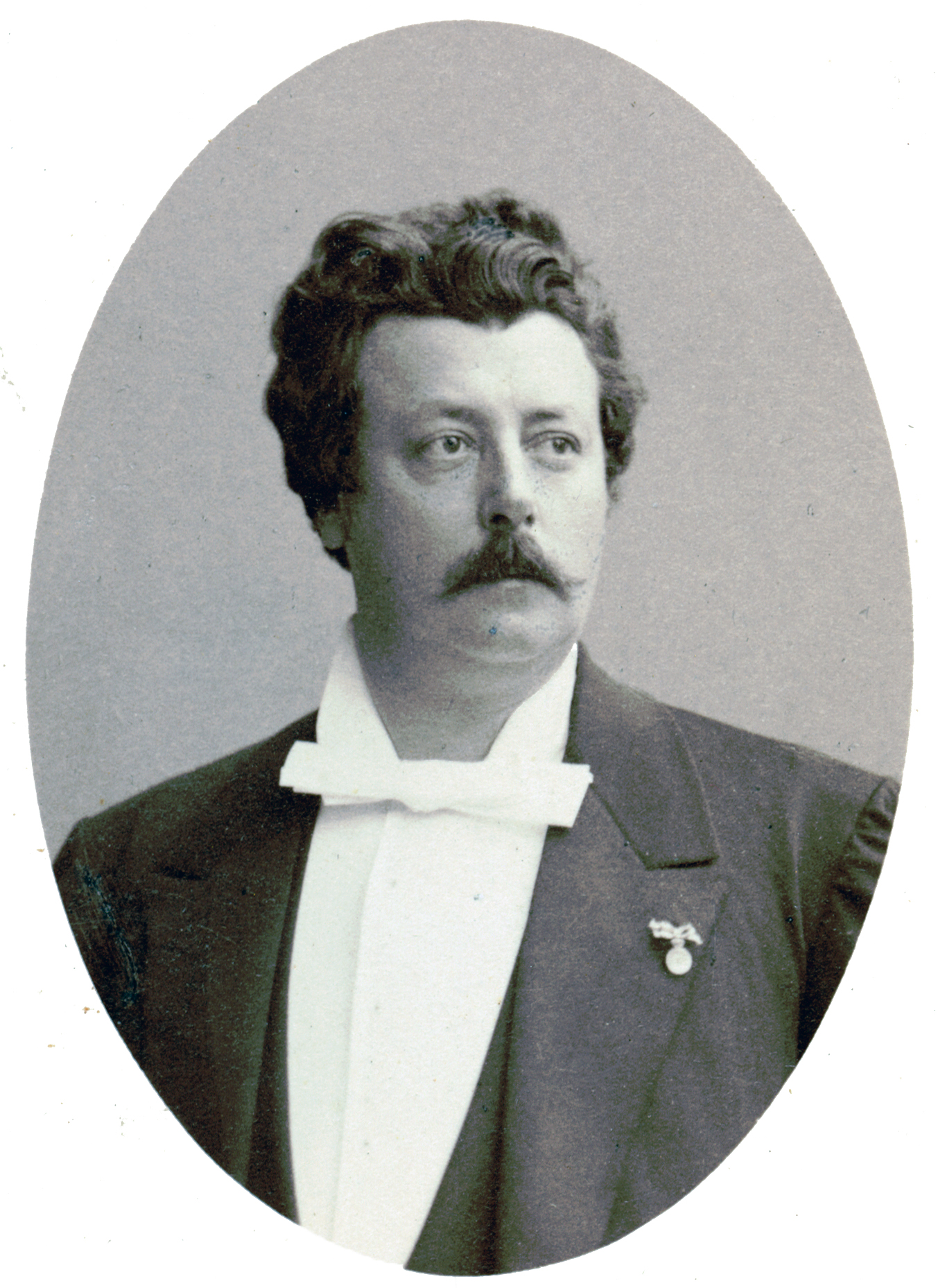 Emil van der Osten, skådespelare vid Nya teatern 1885